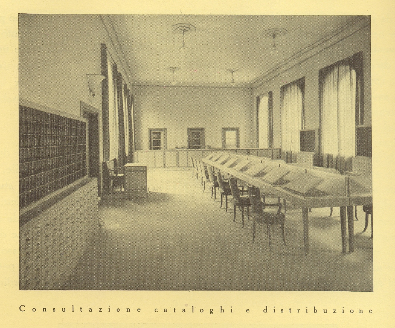 La sala consultazione cataloghi e distribuzione della Biblioteca civica centrale di Torino nel 1929